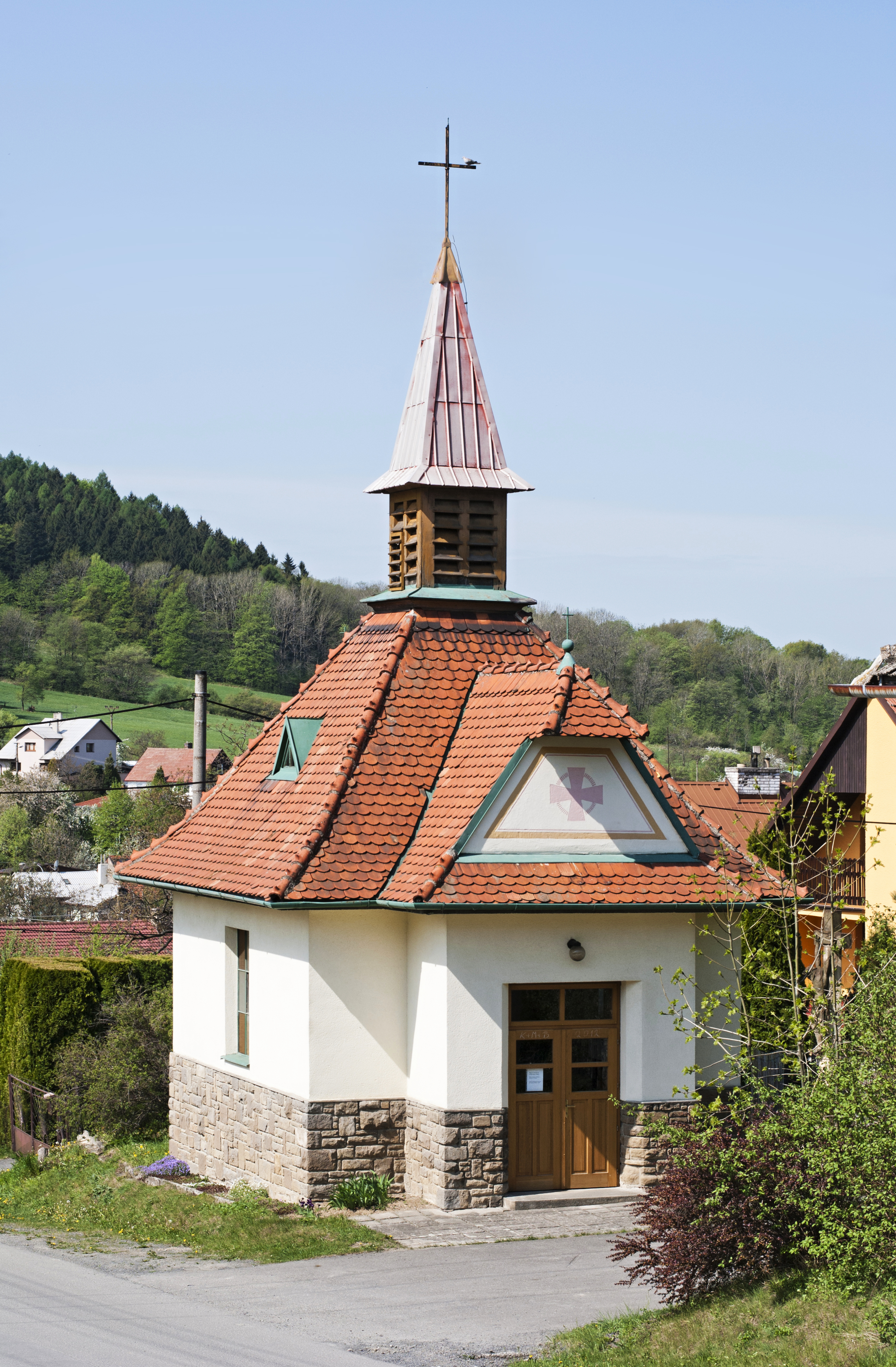 Kaple Svatého Cyrila a Metoděje